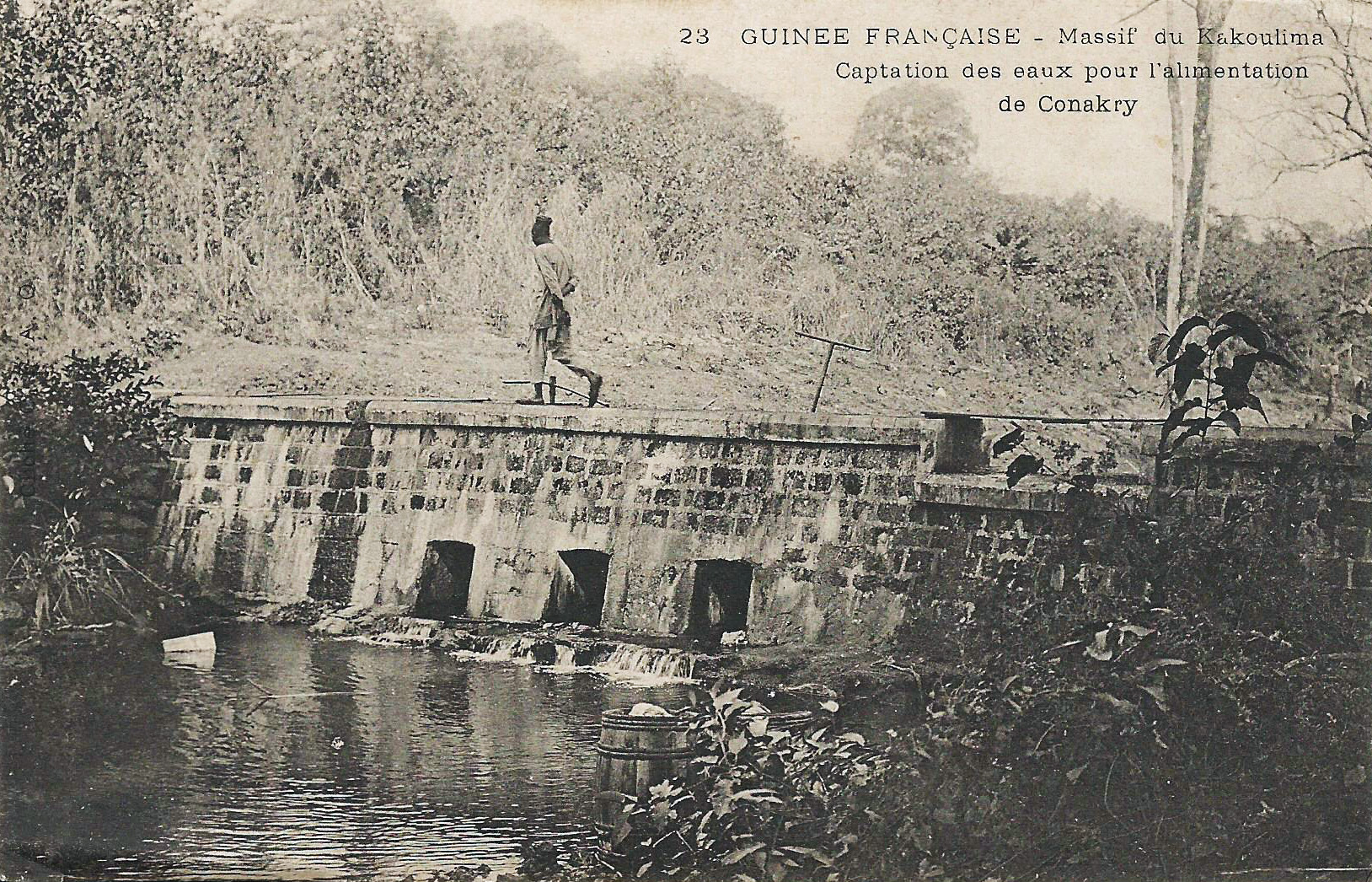 Massif du Kakoulima. Captation des eaux pour l'alimentation de Conakry. Cliché CFAO Guinée française.